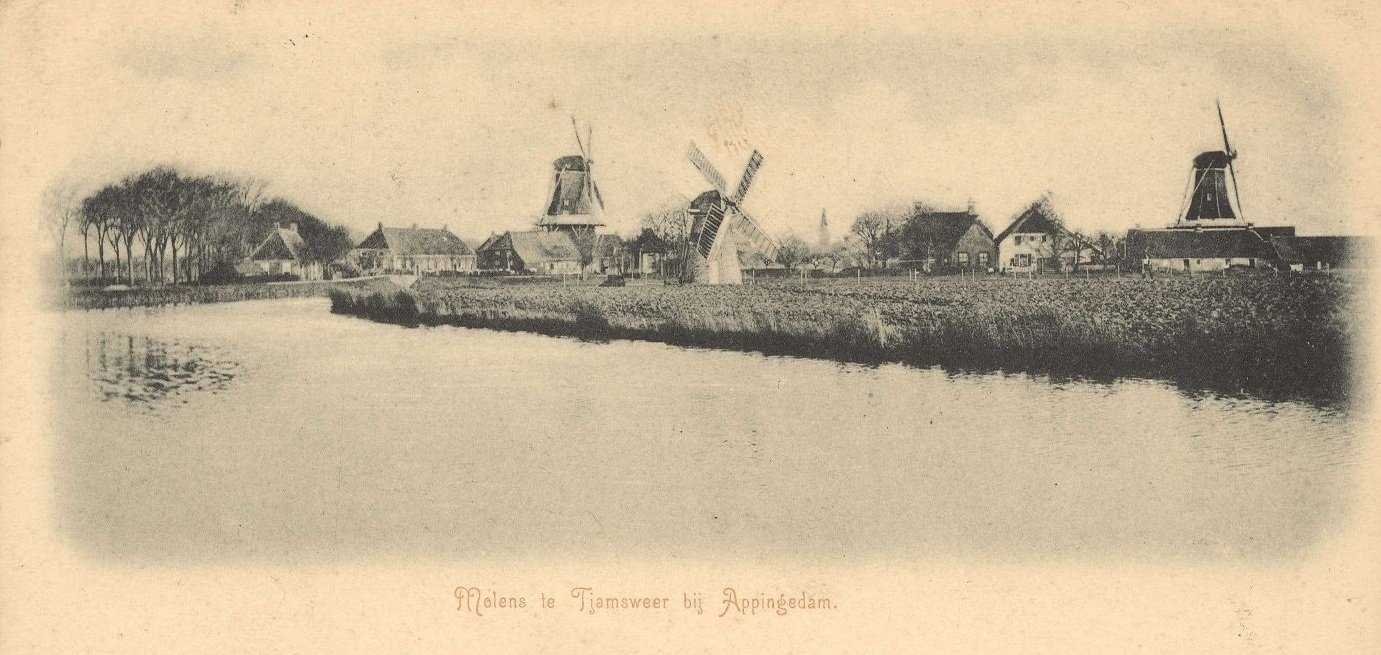 Drie molens langs het Damsterdiep bij Tjamsweer begin 20e eeuw. Links molen van Simon Ennes/Abel Makken (pel- en oliemolen; 1779-1910) aan noordzijde van het diep. Aan de zuidzijde van het diep in het midden 'Veldmans meulntje' in Polder Dijkhuizen (poldermolen; ca. 1900-1920) en rechts de houtzaagmolen van Mulder (1762-1900; verplaatst naar Onderdendam).